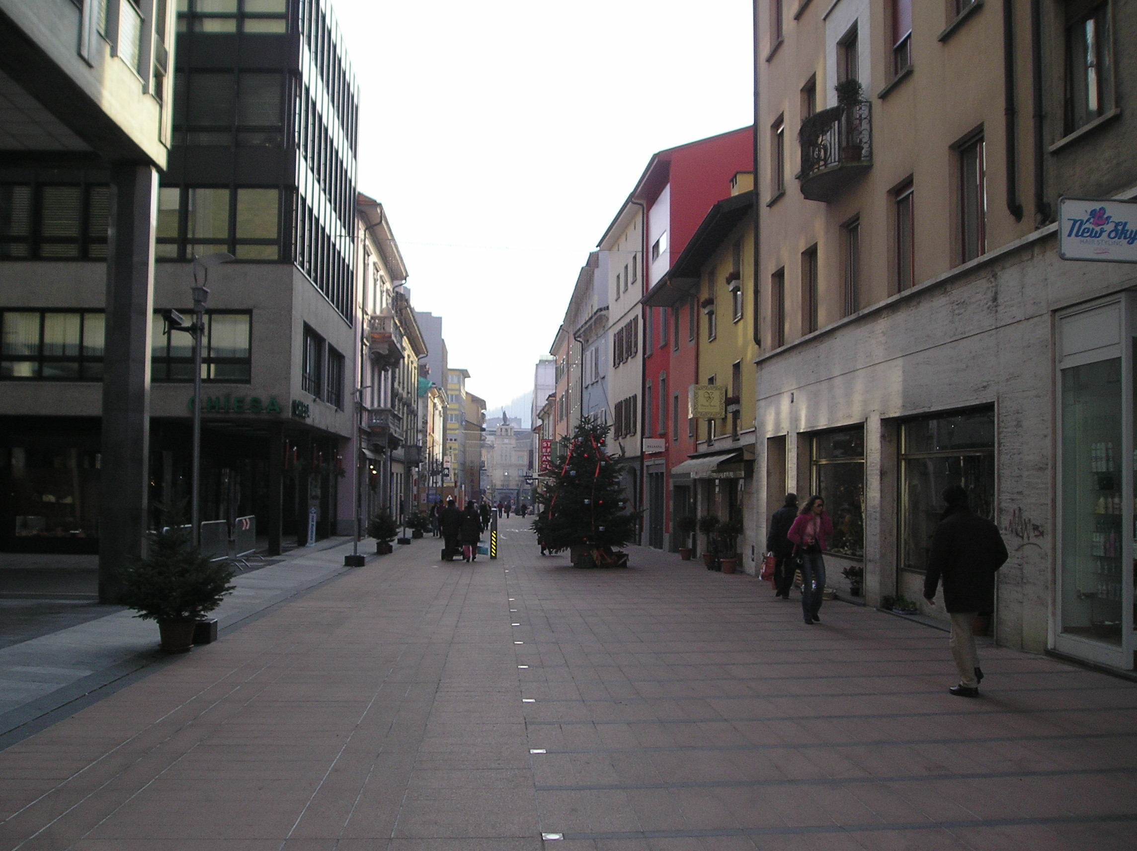 Questa foto rappresenta corso San Gottardo a Chiasso, è stata scattata da me, G. Salluzzi nel dic. 2005 ed è rilasciata in Pubblico Dominio